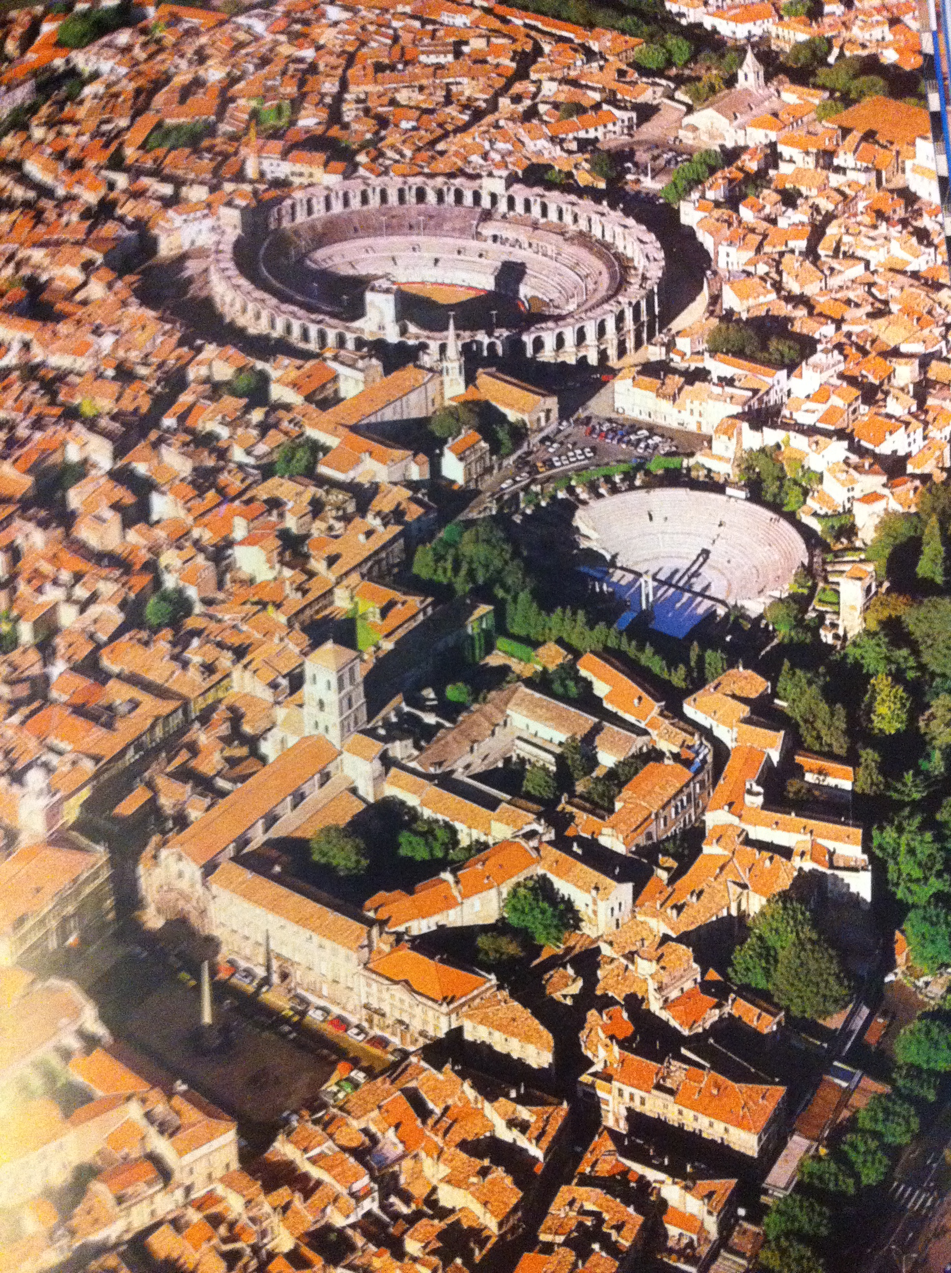 vue aérienne